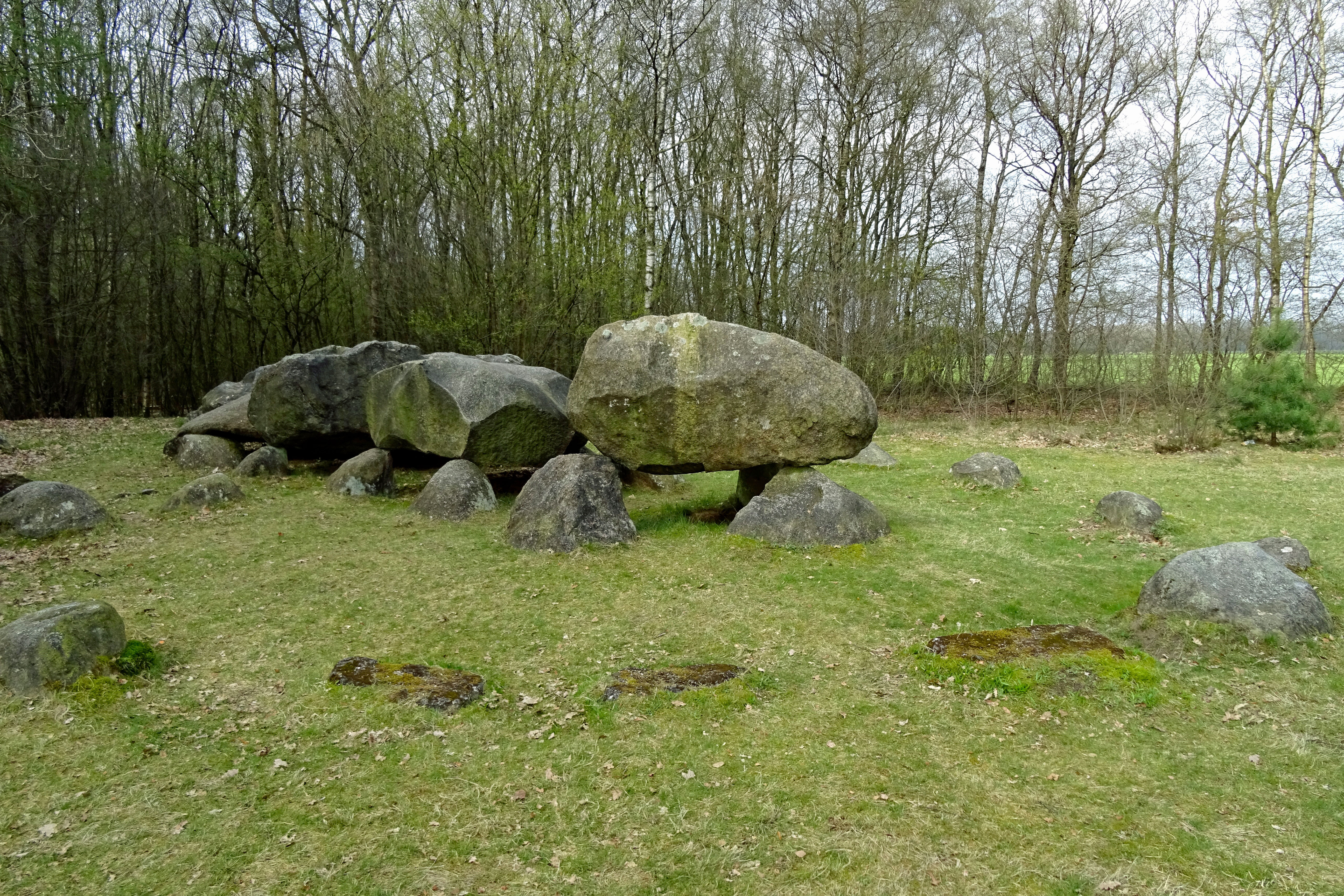 Hunebed D26 in het Drouwenerveld (boswachterij Gieten-Borger)